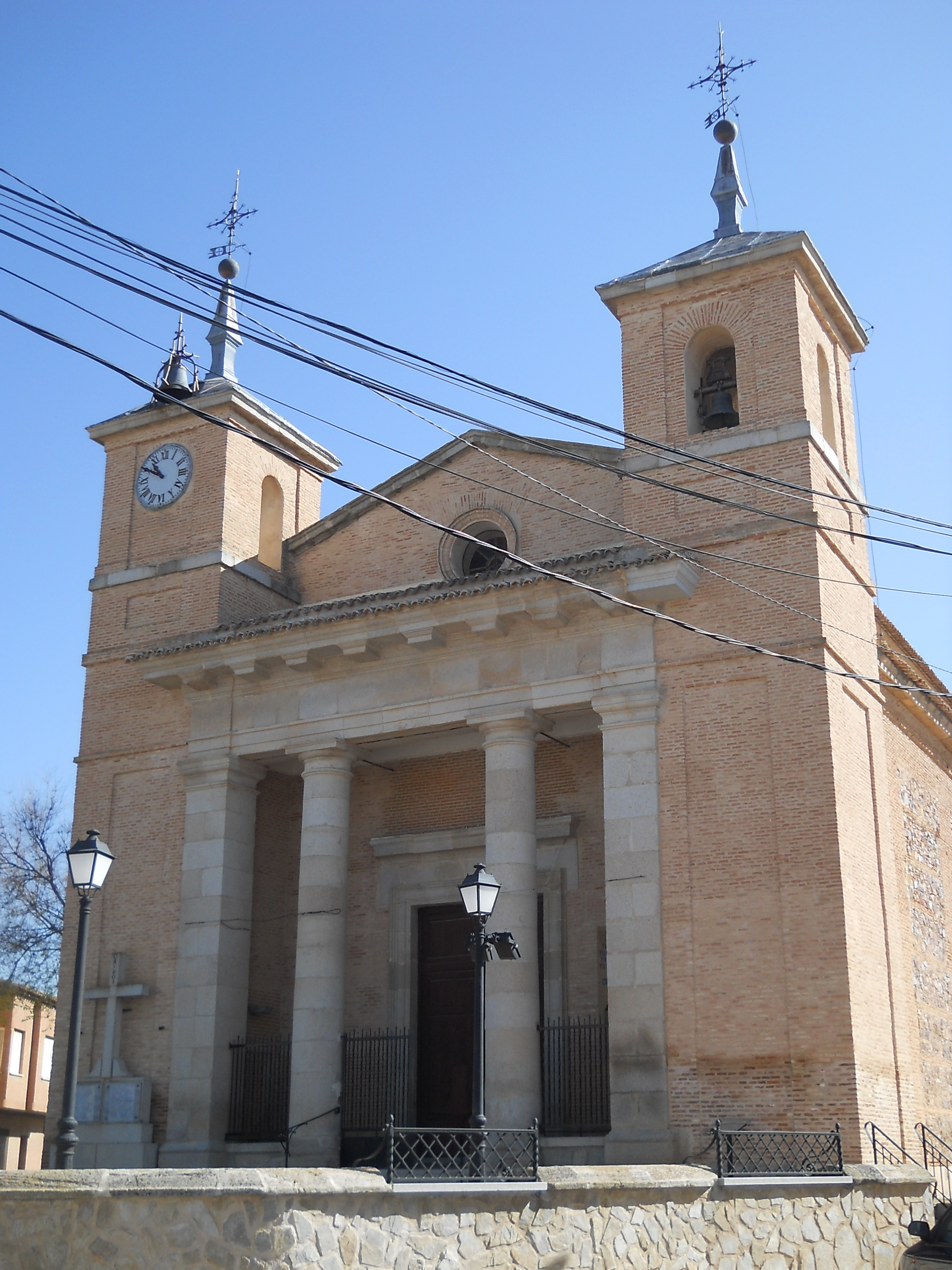 Iglesia de Nuestra Señora de la Asunción, Turleque, Toledo, España